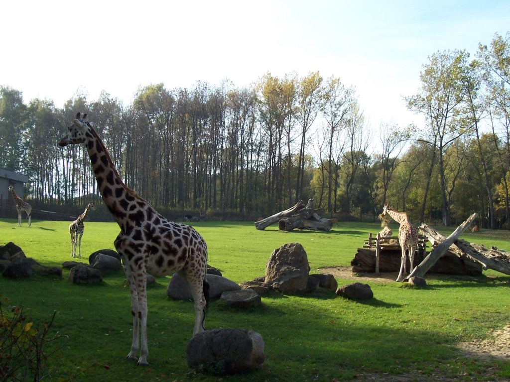 Zoologická zahrada Ostrava, výběh žiraf.